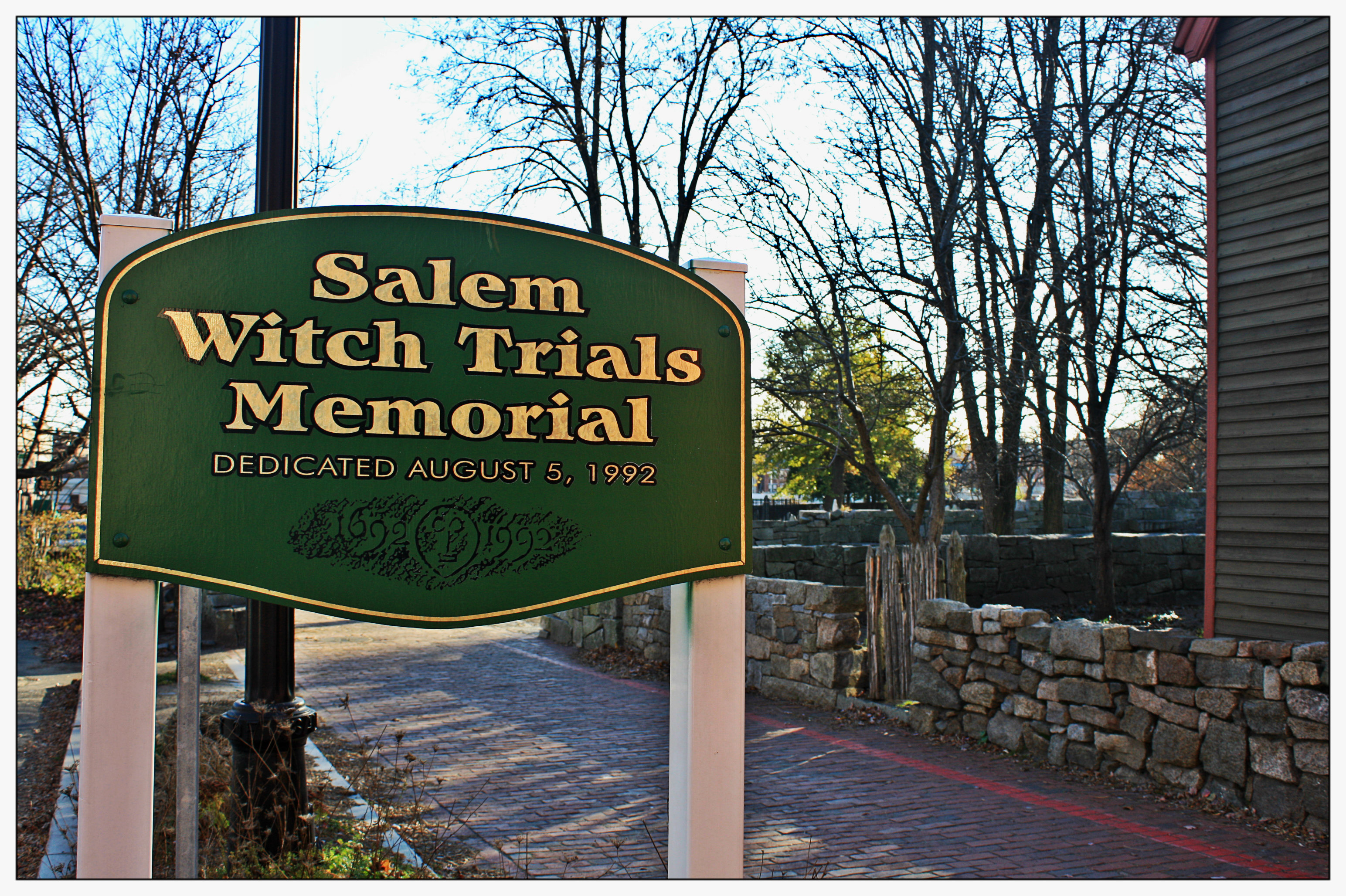 Memorial dels judicis de Salem